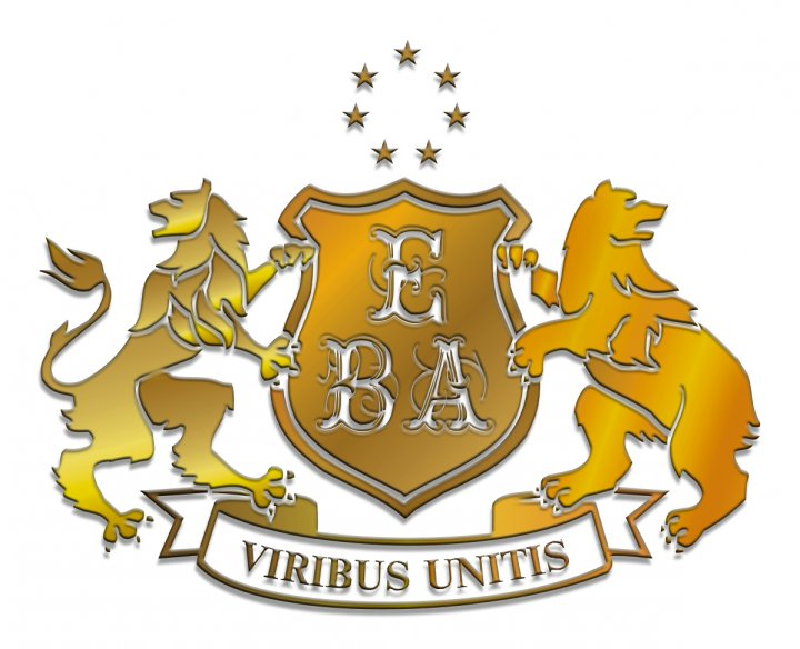 Логотип Європейської Бізнес Асамблеї